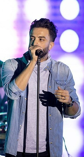 کنسرت بنیامین بهادری در بوشهر (شهریور 95)